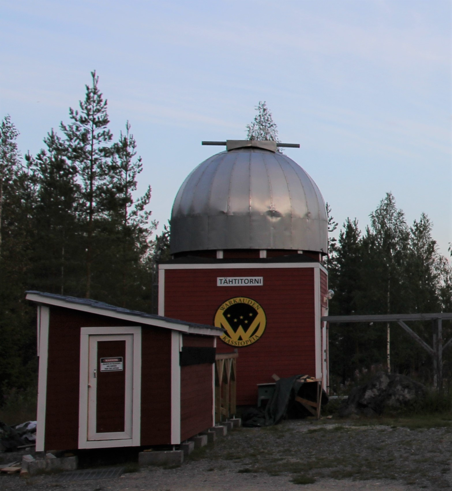 Härkämäen observatorion tähtitorni sijaitsee Varkauden Kangaslammella, katuosoiteessa Härkämäentie 88.